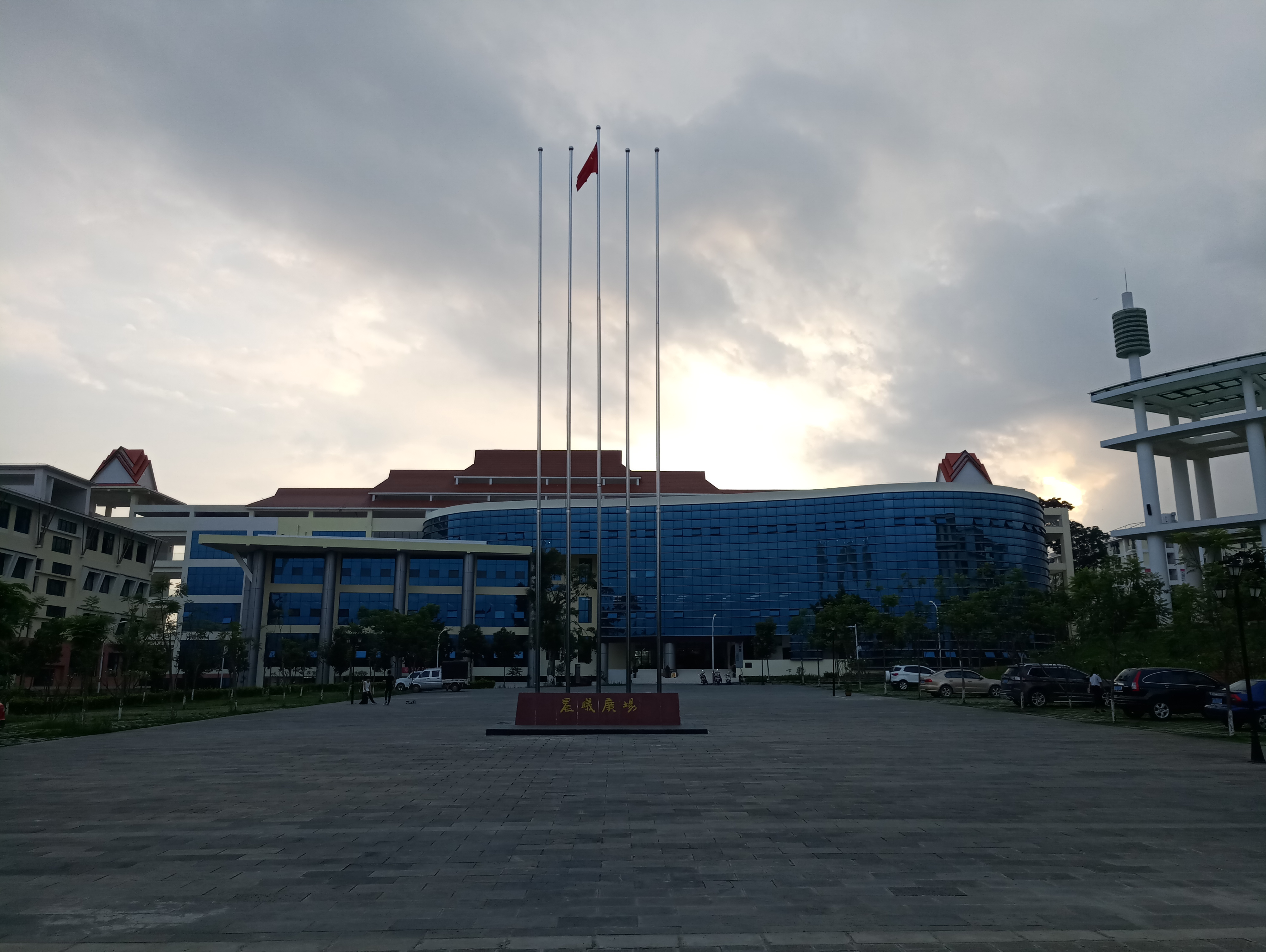 中文（中国大陆）: 德宏师范高等专科学校晨曦广场